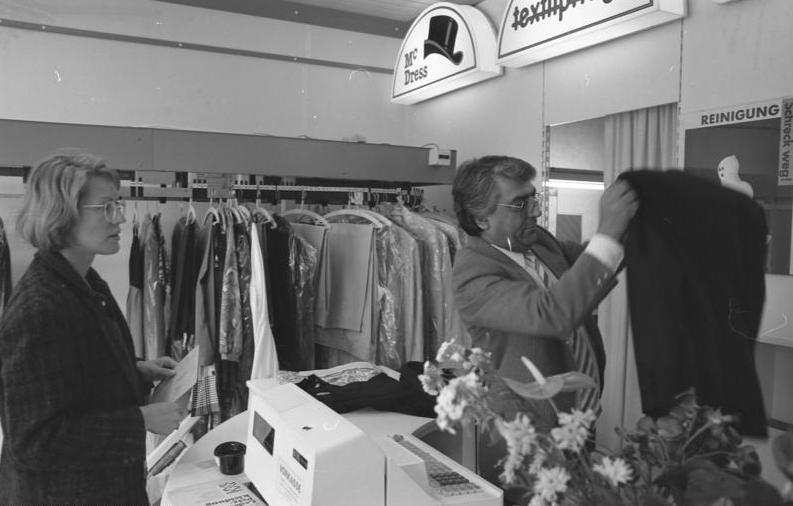 Juni 1988 Bonn- Innenstadt: Chemische Reinigung